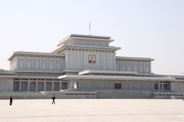 kim_mausoley